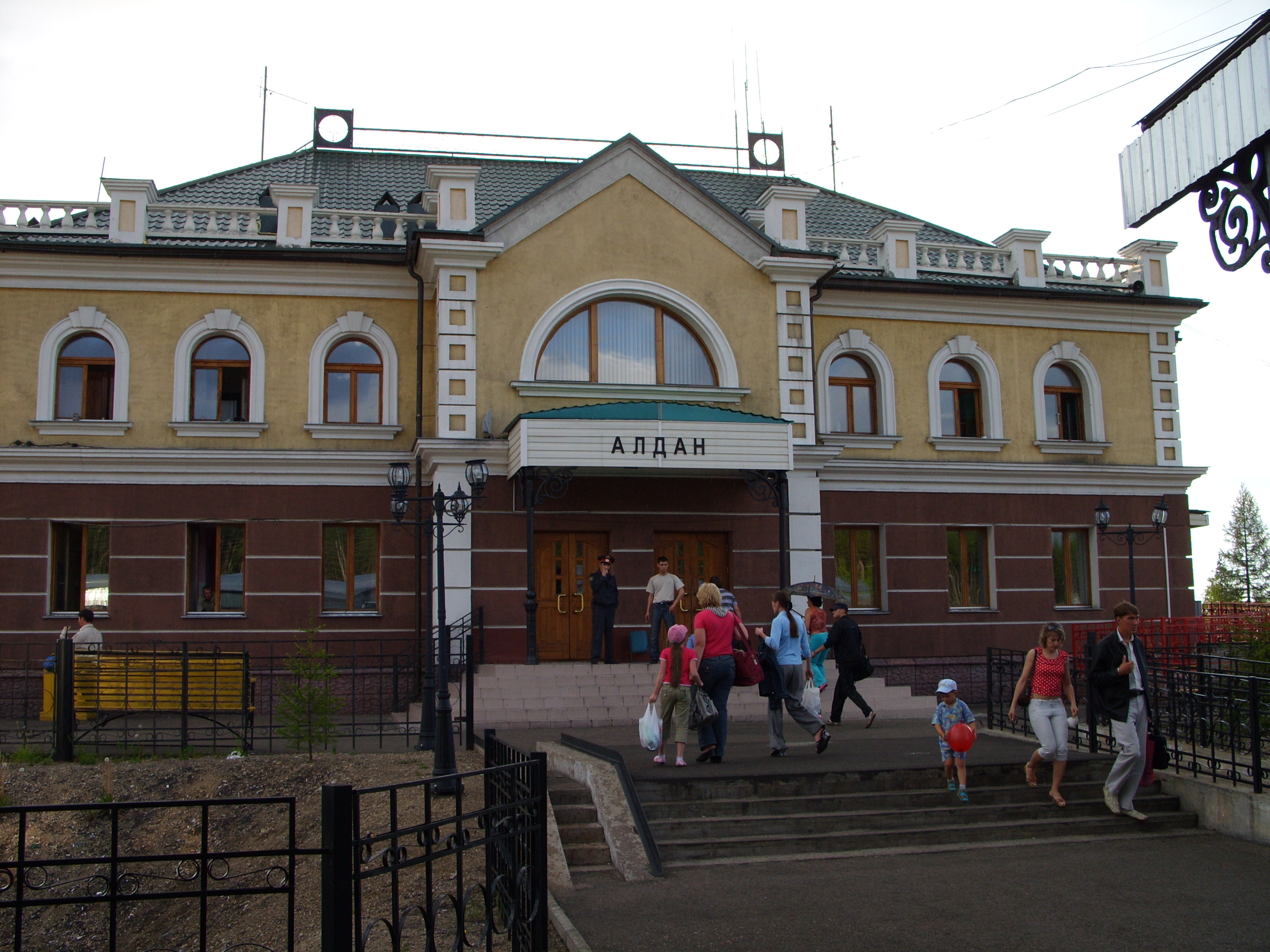 Станция Алдан, вокзал, снимок 2009 г.